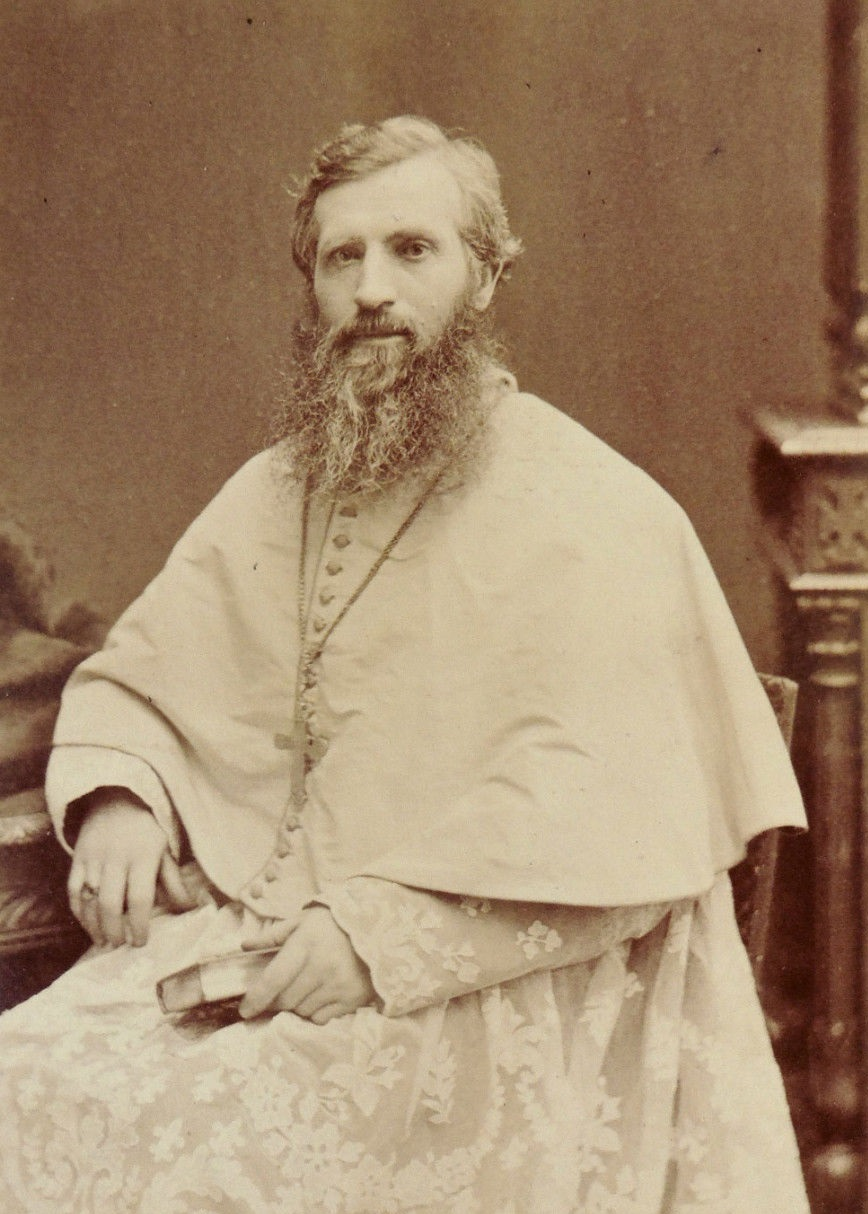 Isidore Clut, photographie du cabinet Victoire à Lyon, vers 1875.